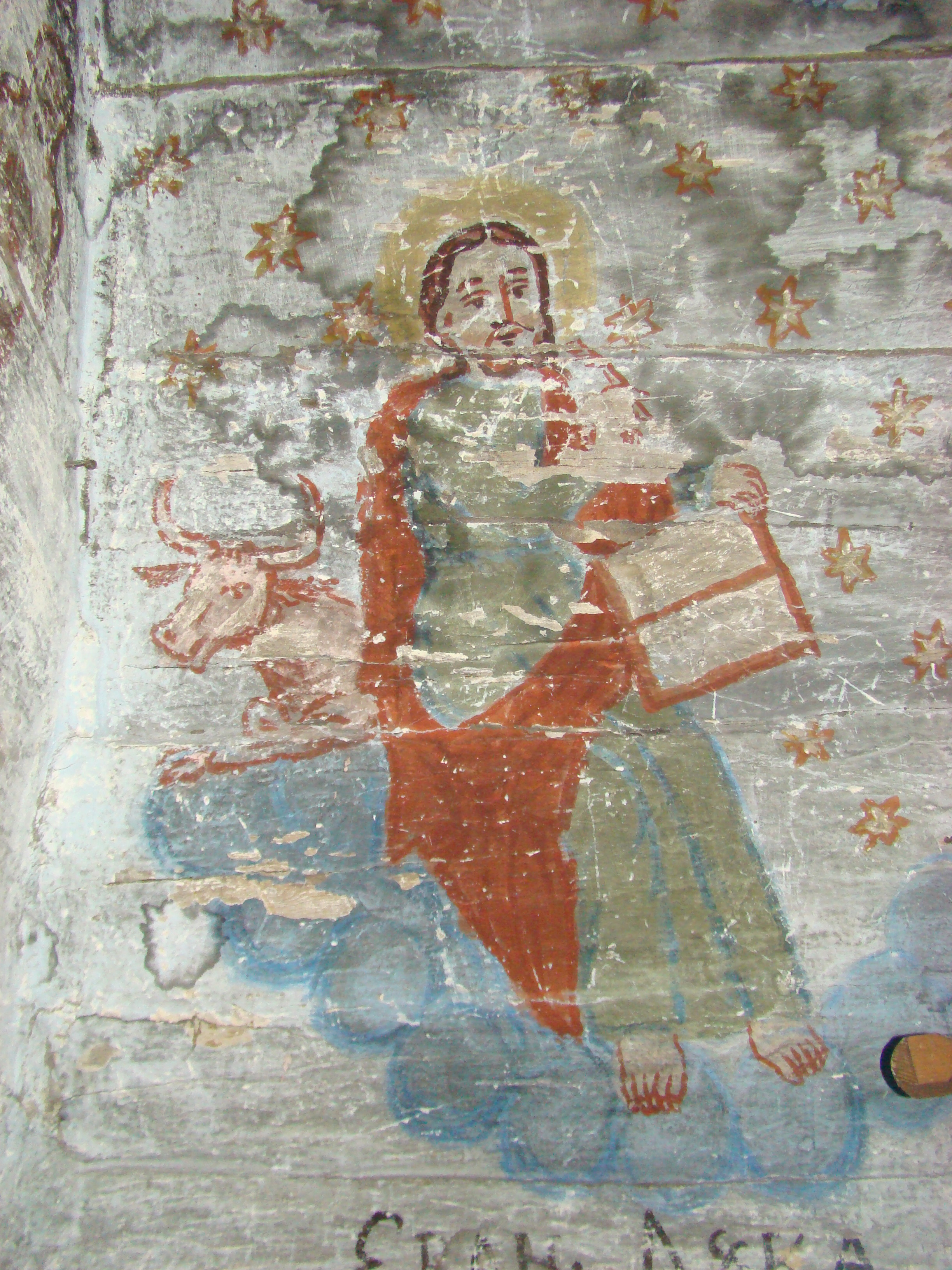 Biserica de lemn "Cuvioasa Paraschiva" , sat STEJERA; comuna MIREŞU MARE